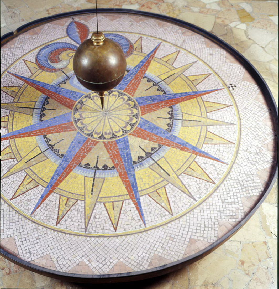 Una sfera di piombo ricoperta di ferro è sospesa al soffitto per mezzo di un lungo cavo di acciaio. Il cavo si aggancia alla soletta per mezzo di uno snodo cardanico che ne consente la libera oscillazione in tutte le direzioni (attriti permettendo). Nella parte inferiore della sfera è avvitato un puntale che però è di lunghezza tale da non toccare il pavimento. Sul pavimento, esattamente sotto al pendolo e perfettamente centrato rispetto al punto di sospensione, è posizionato un disco di grande dimensioni realizzato a mosaico con tessere variamente colorate raffiguranti la rosa dei venti Il pendolo può essere messo in oscillazione (da un operatore autorizzato) per dimostrare il fenomeno della rotazione terrestre. Funzione Il pendolo di Foucault permise nel 1870 di dimostrare per la prima volta in modo diretto il fenomeno della rotazione terrestre. Il suo principio di funzionamento si basa su un principio fisico ben noto fin dai tempi di Galileo (quello dell'immutabilità del piano di oscillazione del pendolo) nonché il principio di inerzia formalizzato da Newton. Questo strumento, che dal punto di vista tecnologico è di una semplicità disarmante, occupa un posto di assoluto rilievo nella storia della scienza e della fisica in particolare.